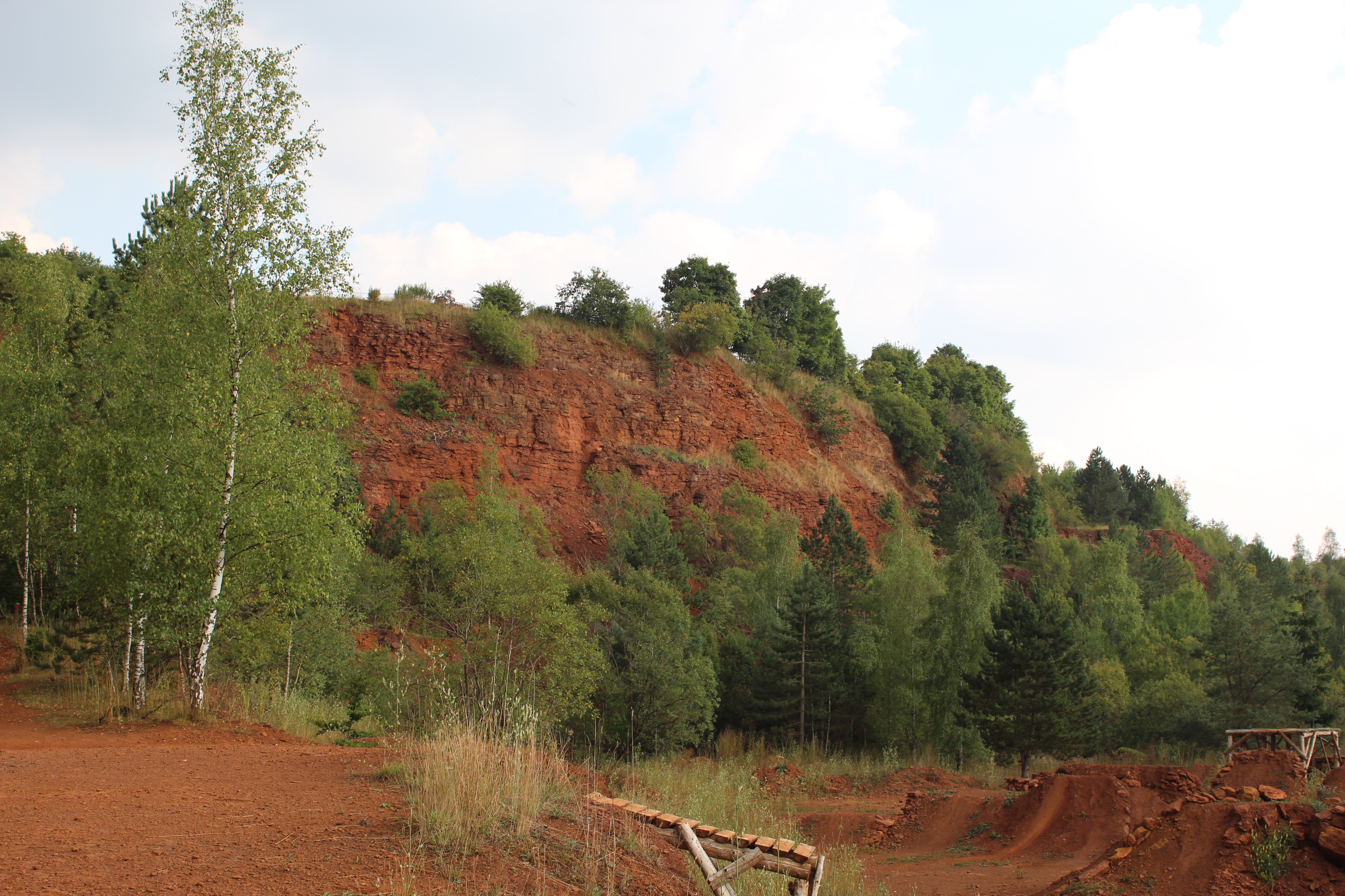 Am Naturschutzgebitt Brucherbierg-Lallengerbierg.